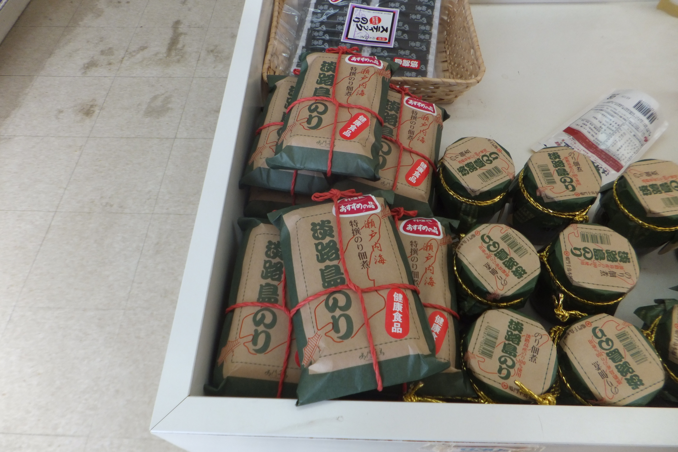 淡路島海苔